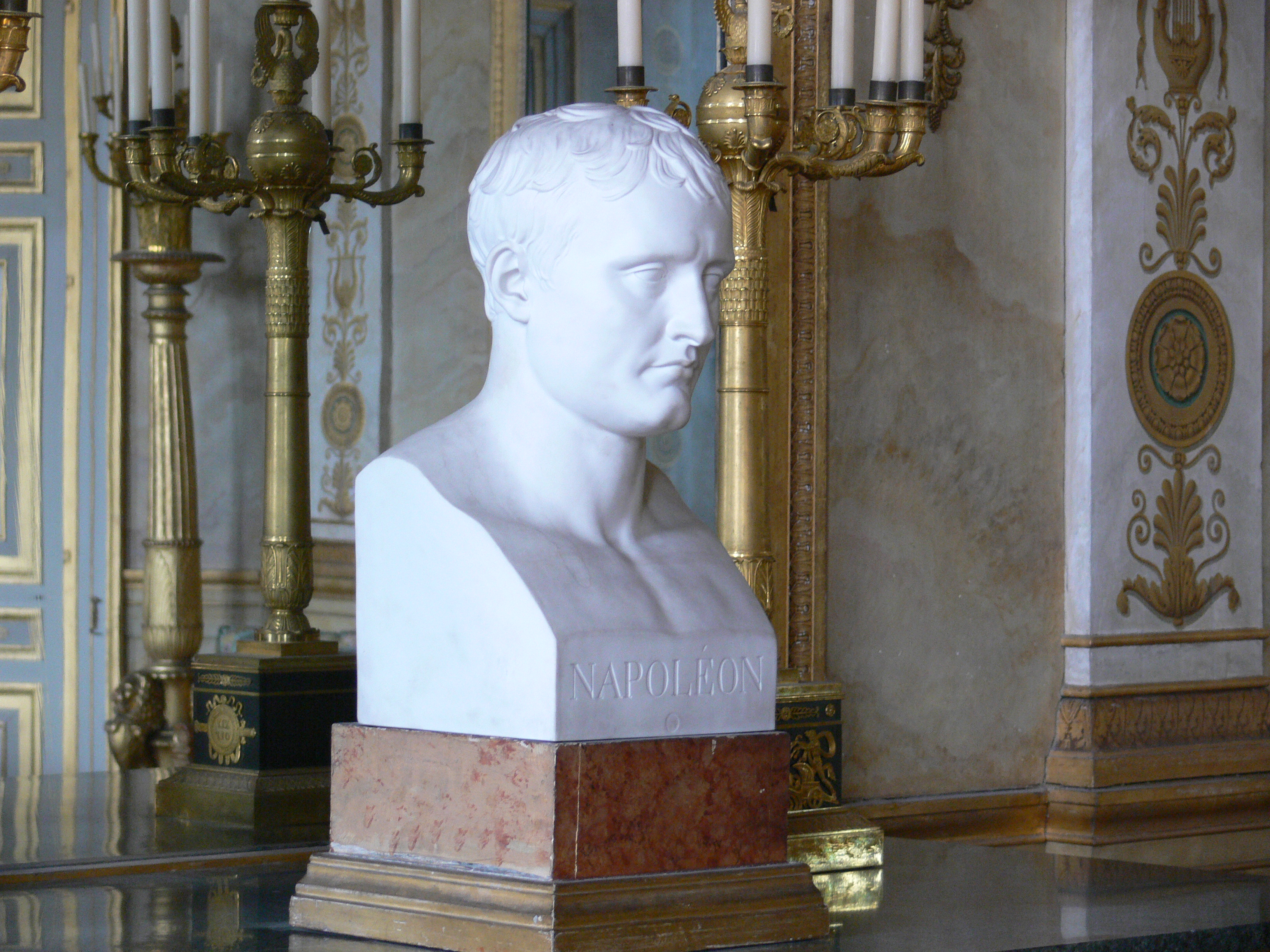 Compiègne, France: Château de Compiègne Les appartements historiques Grand salon de reception de l'imperatrice, Buste de Napoléon I